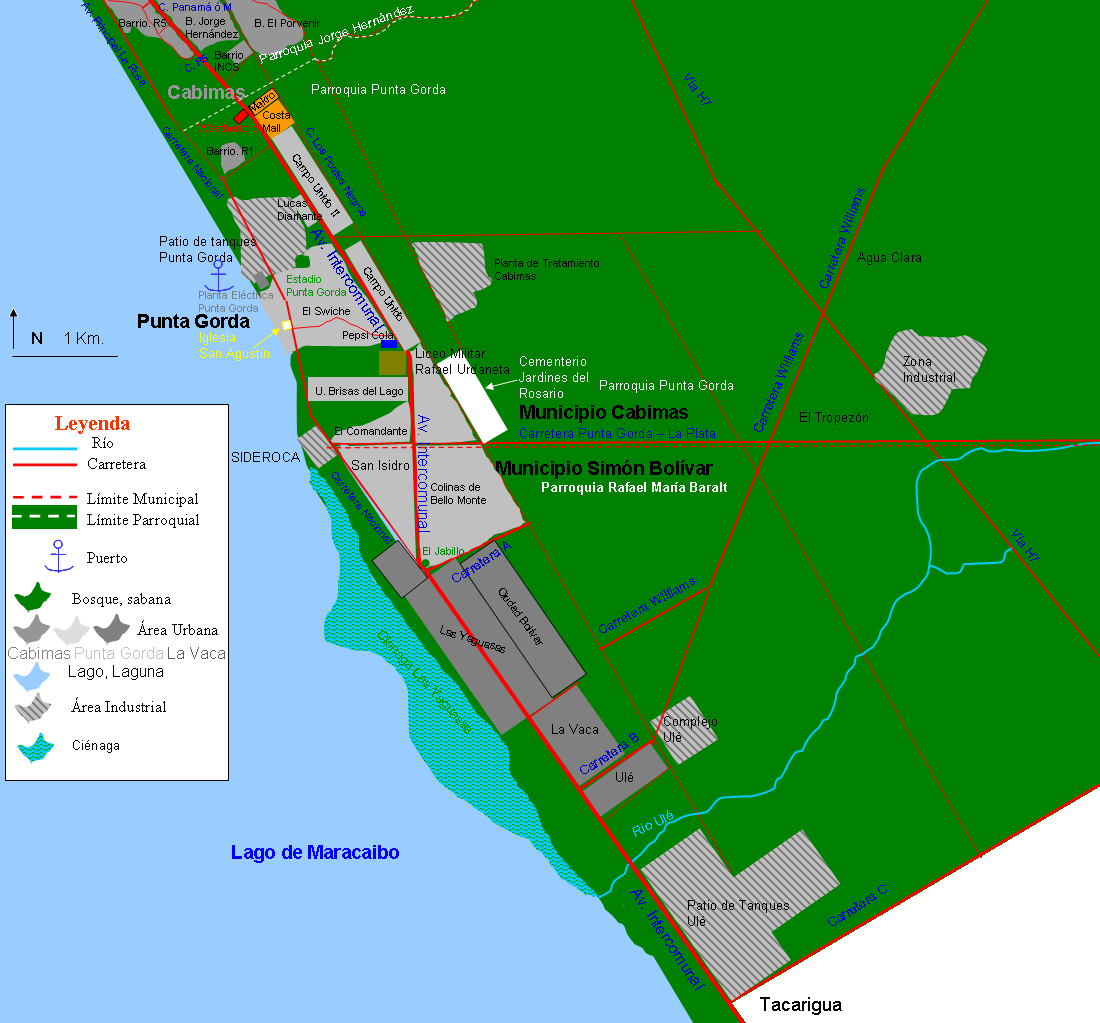 Mapa de Punta Gorda y poblaciones vecinas, municipios Cabimas y Simón Bolívar, estado Zulia, Venezuela. Sólo se muestran los sectores y las calles principales, hay mas calles secundarias, que serían muy pequeñas para la escala en la que está el mapa.